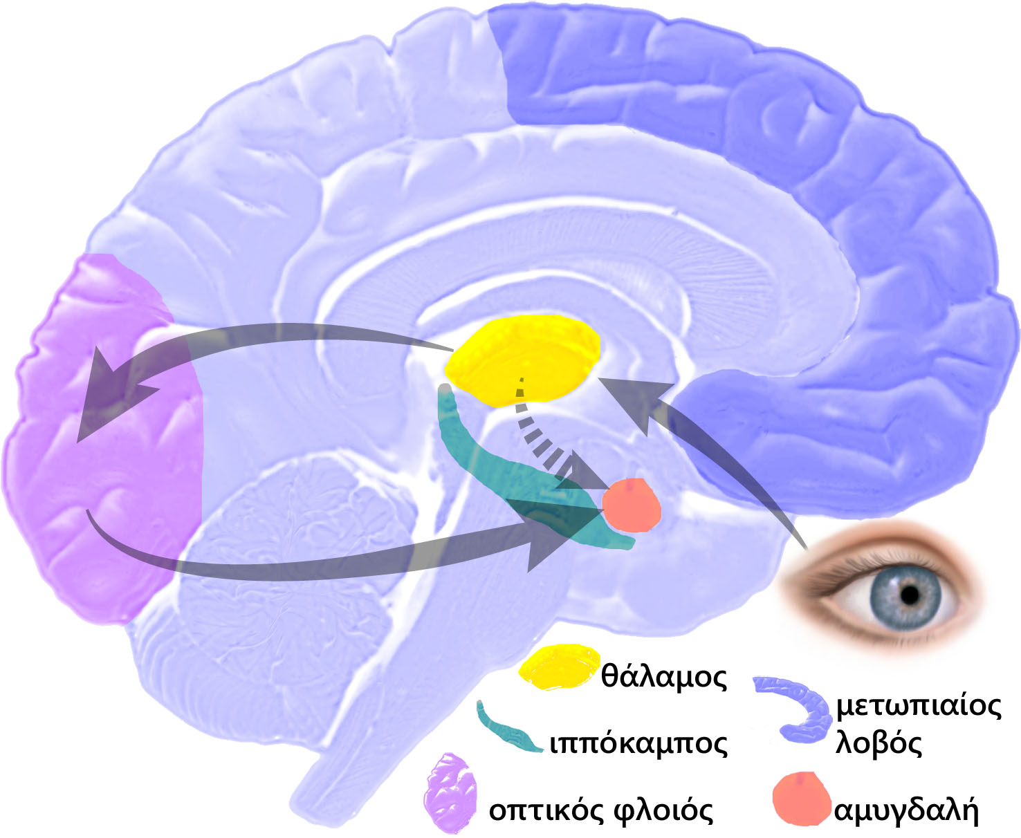 Ανθρώπινος εγκέφαλος με φωτισμένα τμήματα που εμπλέκονται σε μια συναισθηματική πειρατεία φόβου από οπτικό ερέθισμα.